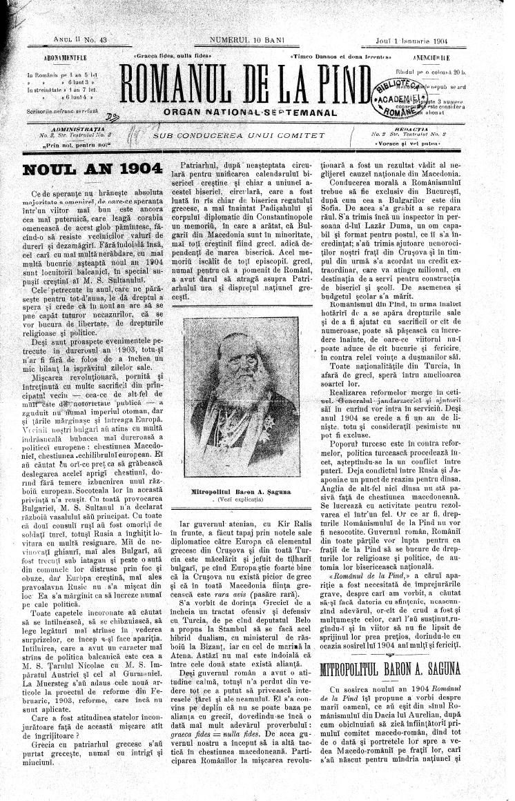 Вестник „Romanul de la Pind“.